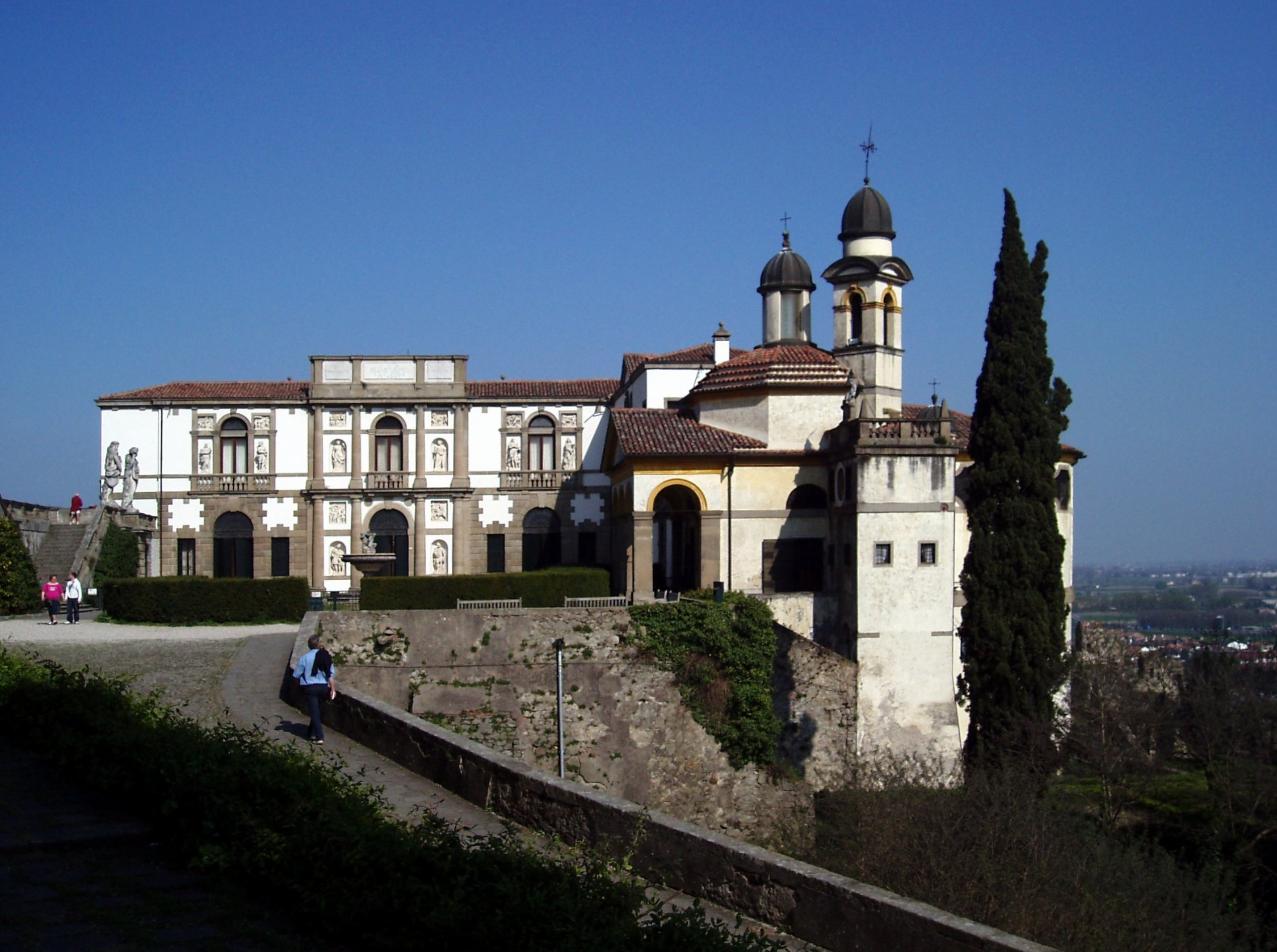 Villa Duodo e chiesa di San Giorgio, Monselice, Italy